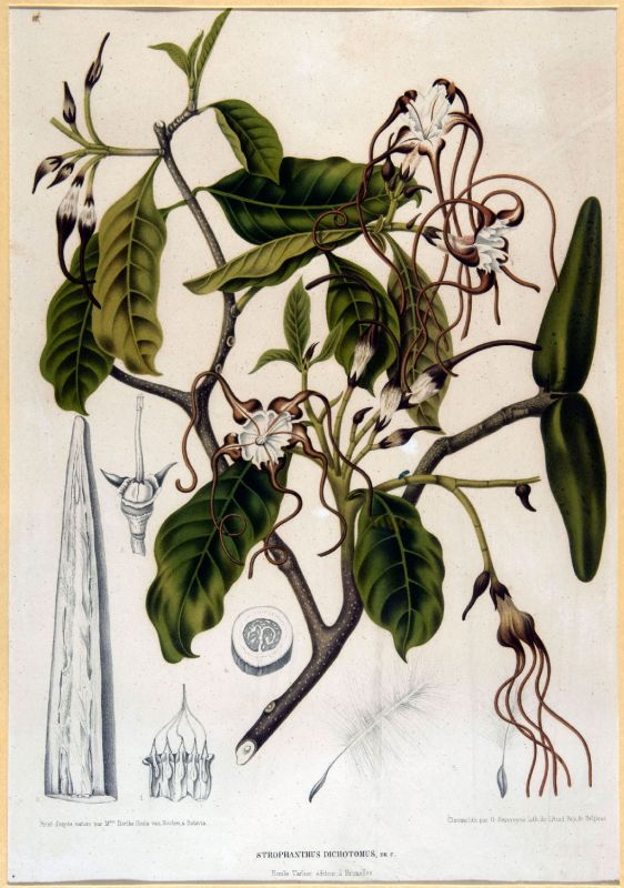 Litho. Het blad en de bloemen van de Strophantus Dichotomus